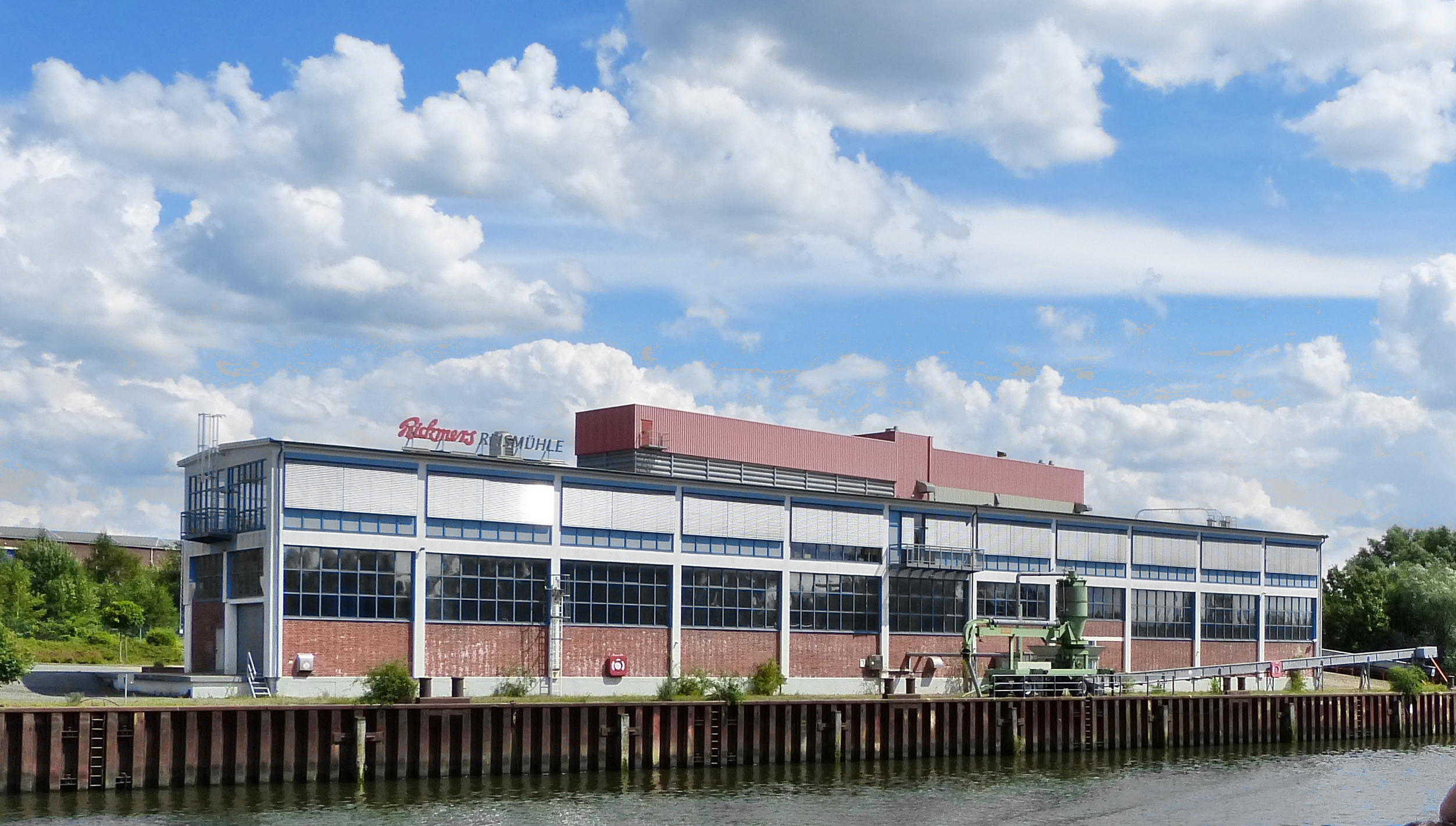 Rickmers Reismühle, Bremen, Weserseite